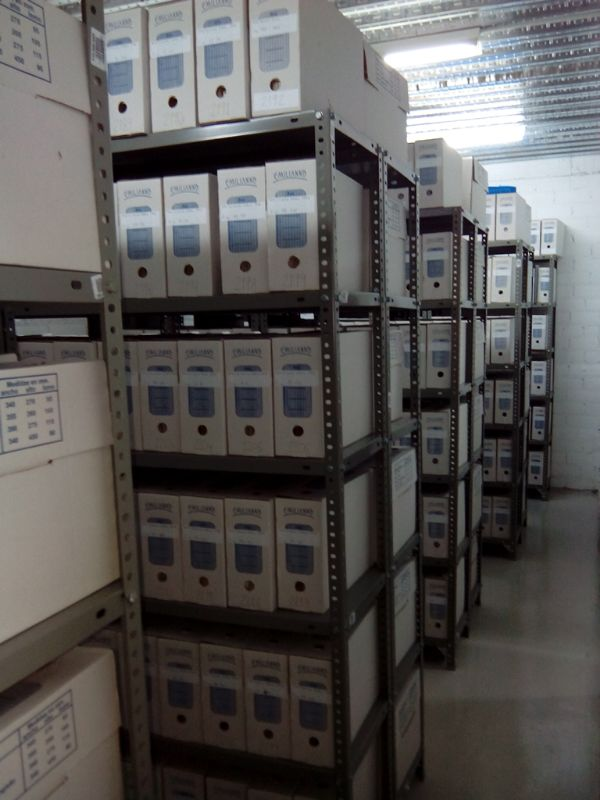 fotografia de les instalacions de l'Arxiu Municipal de Maçanet de la Selva